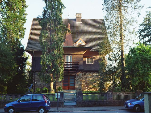 Denkmalgeschützte Villa Niederberger in der Schmidstraße 3 in Friedrichshafen. Baustil: Expressionistische Wohnhausarchitektur Erbaut: 1927 von Architekt Ernst Niederberger